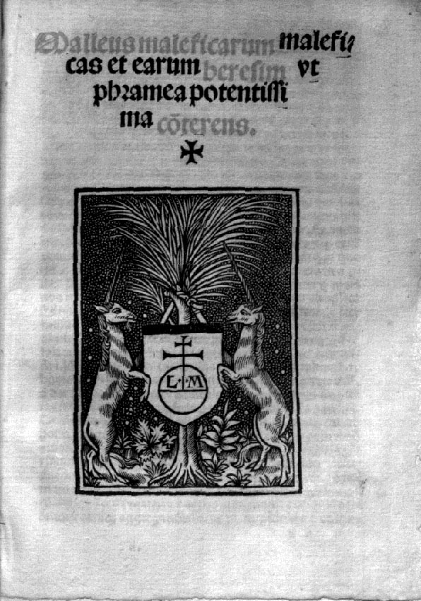 Malleus maleficarum maleficas ... Impressus Lugduni: per honestum virum Ioannem marion, 1519 Lyon 1519 malleus edition